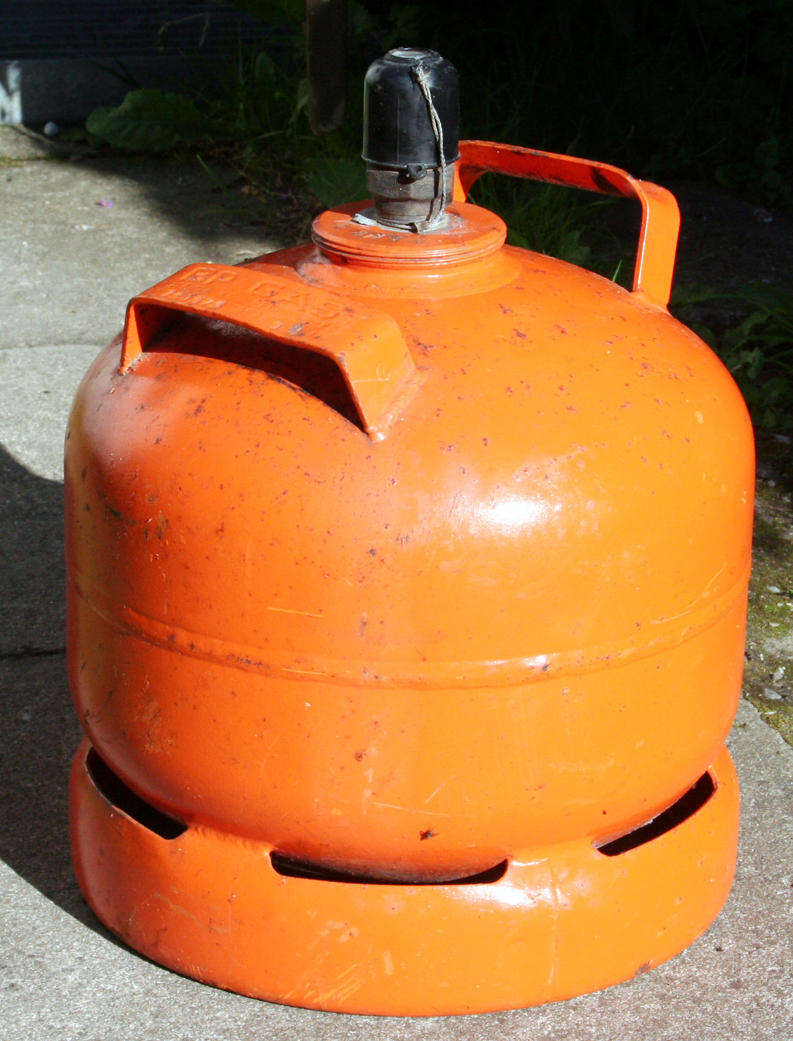 5 liter BP gasflaske med brudt plombe